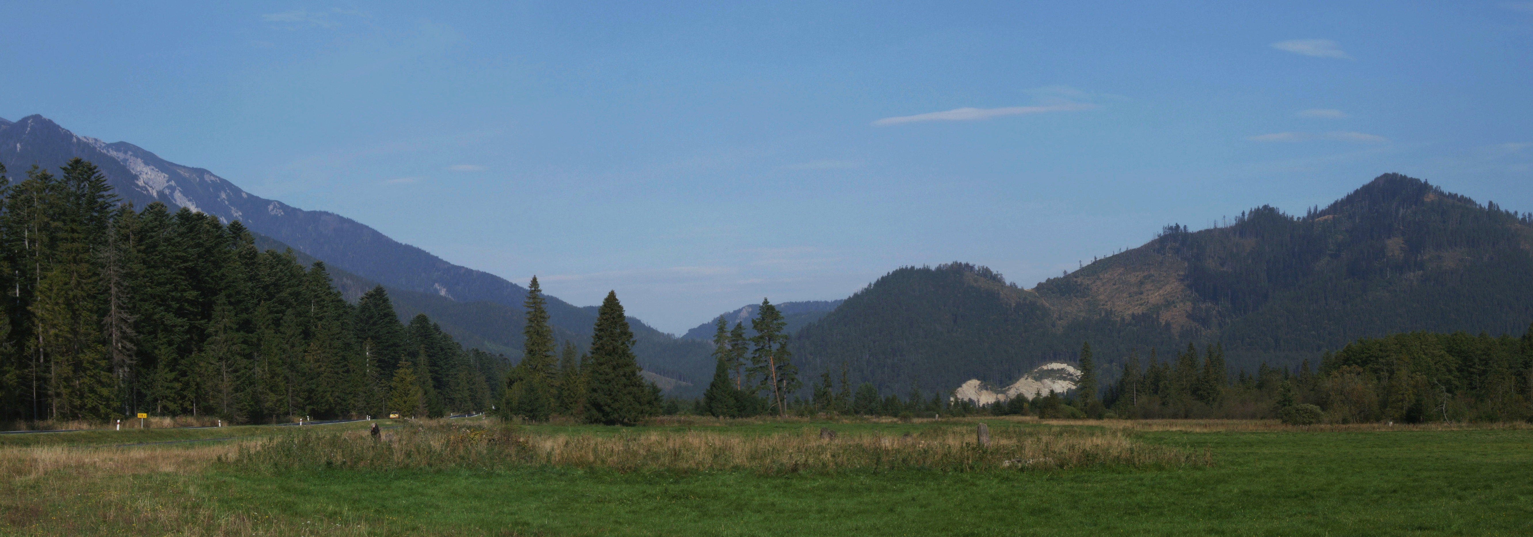 Dolina Kotliny. z lewej strony Tatry, z prawej Magura Spiska (wzniesienia Kotka i Huzar)